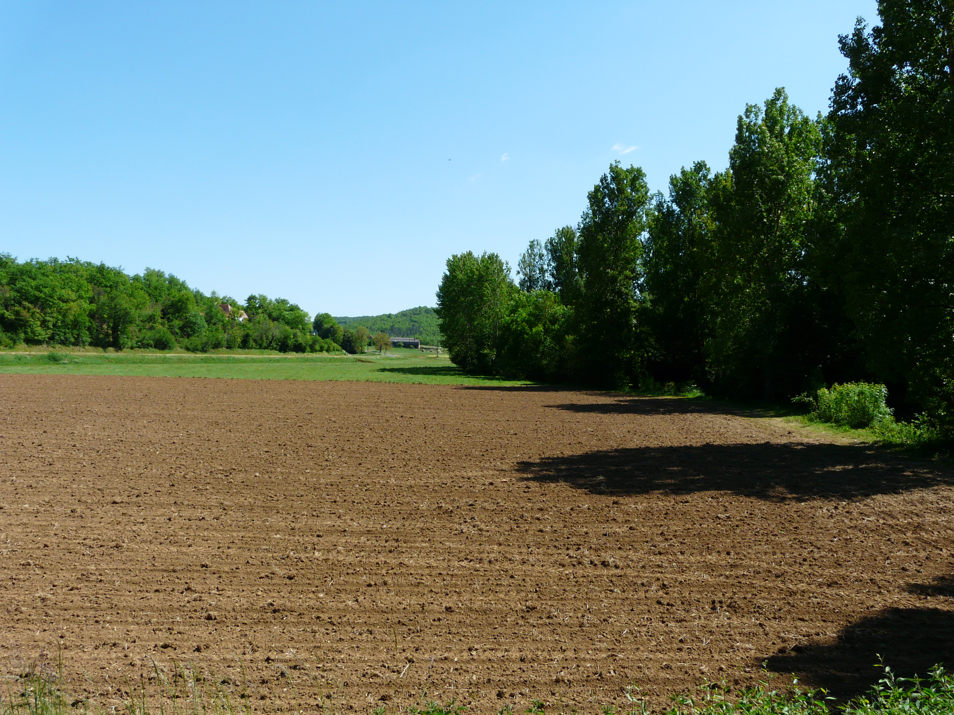 Au niveau du pont de Gaumier, la vallée du Céou, Saint-Martial-de-Nabirat, Dordogne, France.